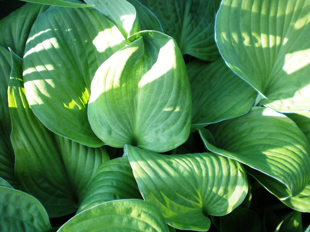 Gyslotinė melsvė